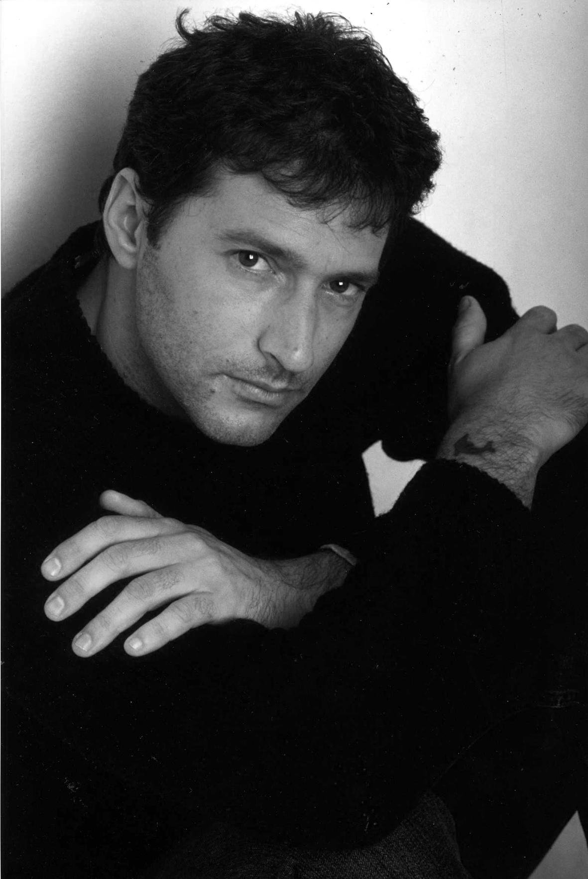 Massimiliano Virgilii: attore, doppiatore, regista